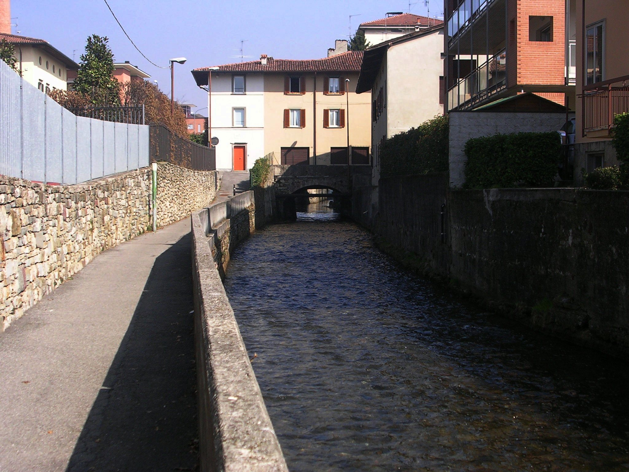 La roggia Serio Grande presso Redona (Bergamo)